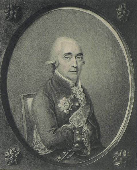 Юрий Александрович Нелединский-Мелецкий (1752-1829), поэт.